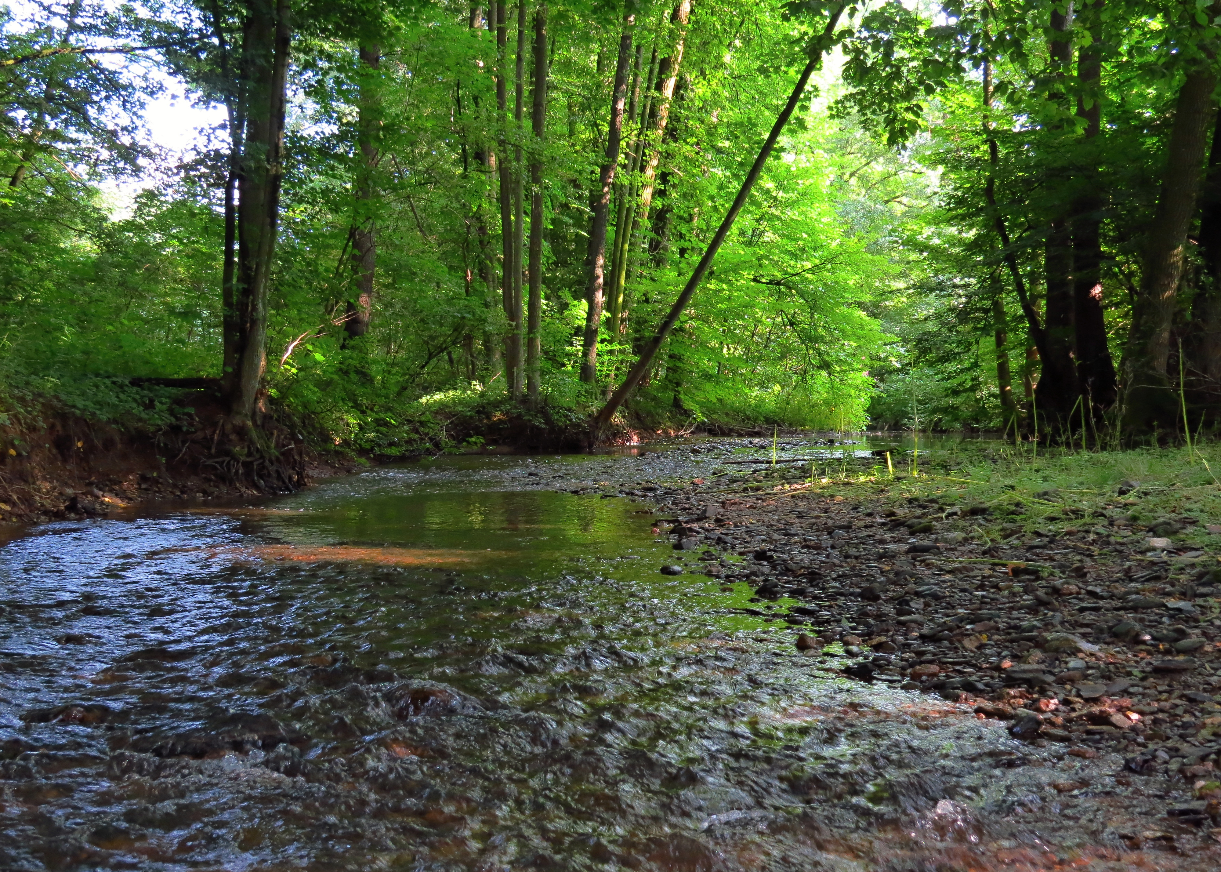 Project: Chráněná území.